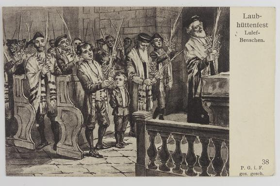 A postcard showing the blessing of the lulav in the synagogue, this is a festive palm-branch which with the etrog is carried and waved on the Feast of Tabernacles, or Sukkot. One of a set of 49 postcards showing scenes of Jewish life in Frankfurt. קטגוריה:סוכות